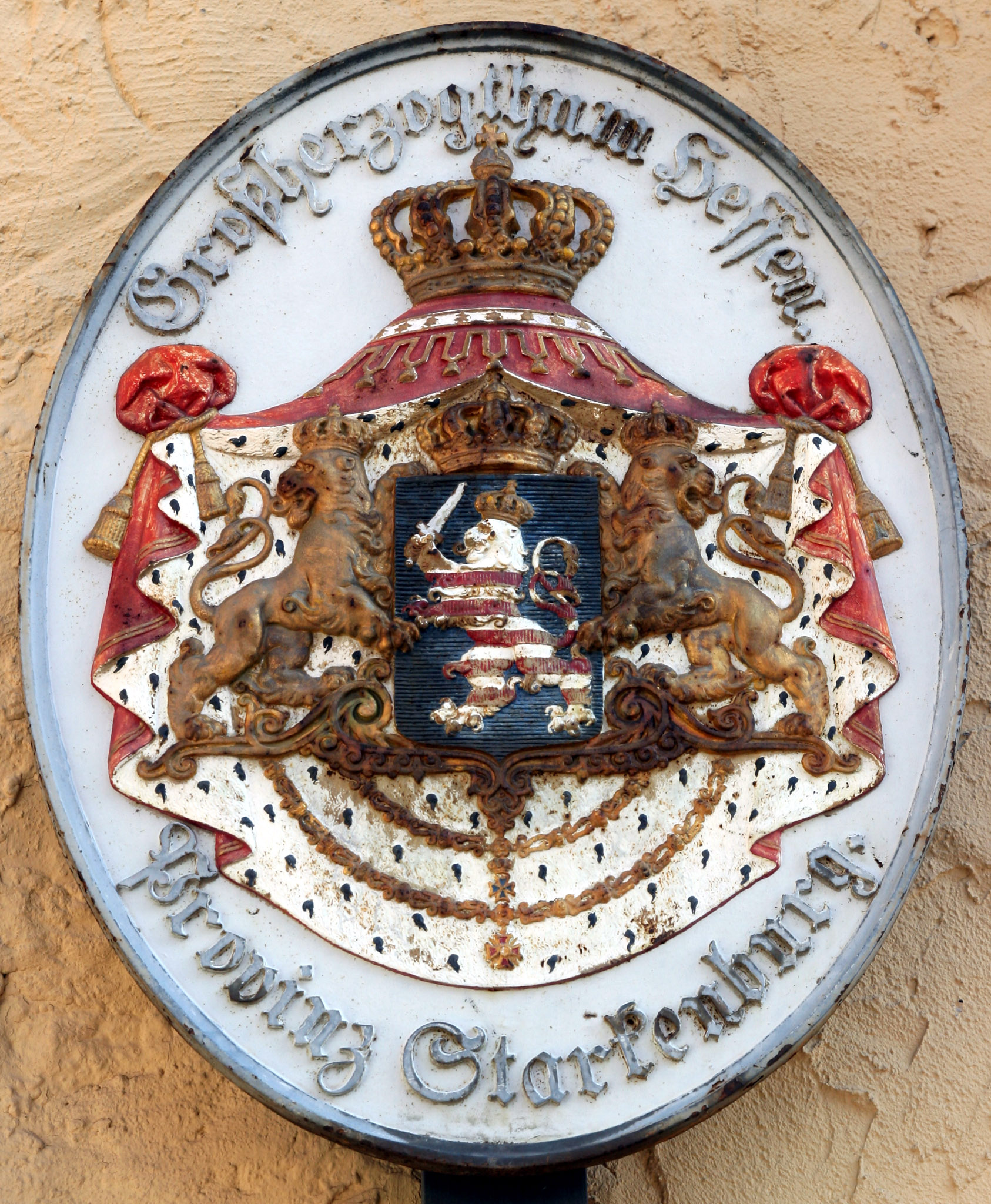 Das Wappen der Provinz Starkenburg. Fotografiert am Städtischen Museum der Stadt Bensheim